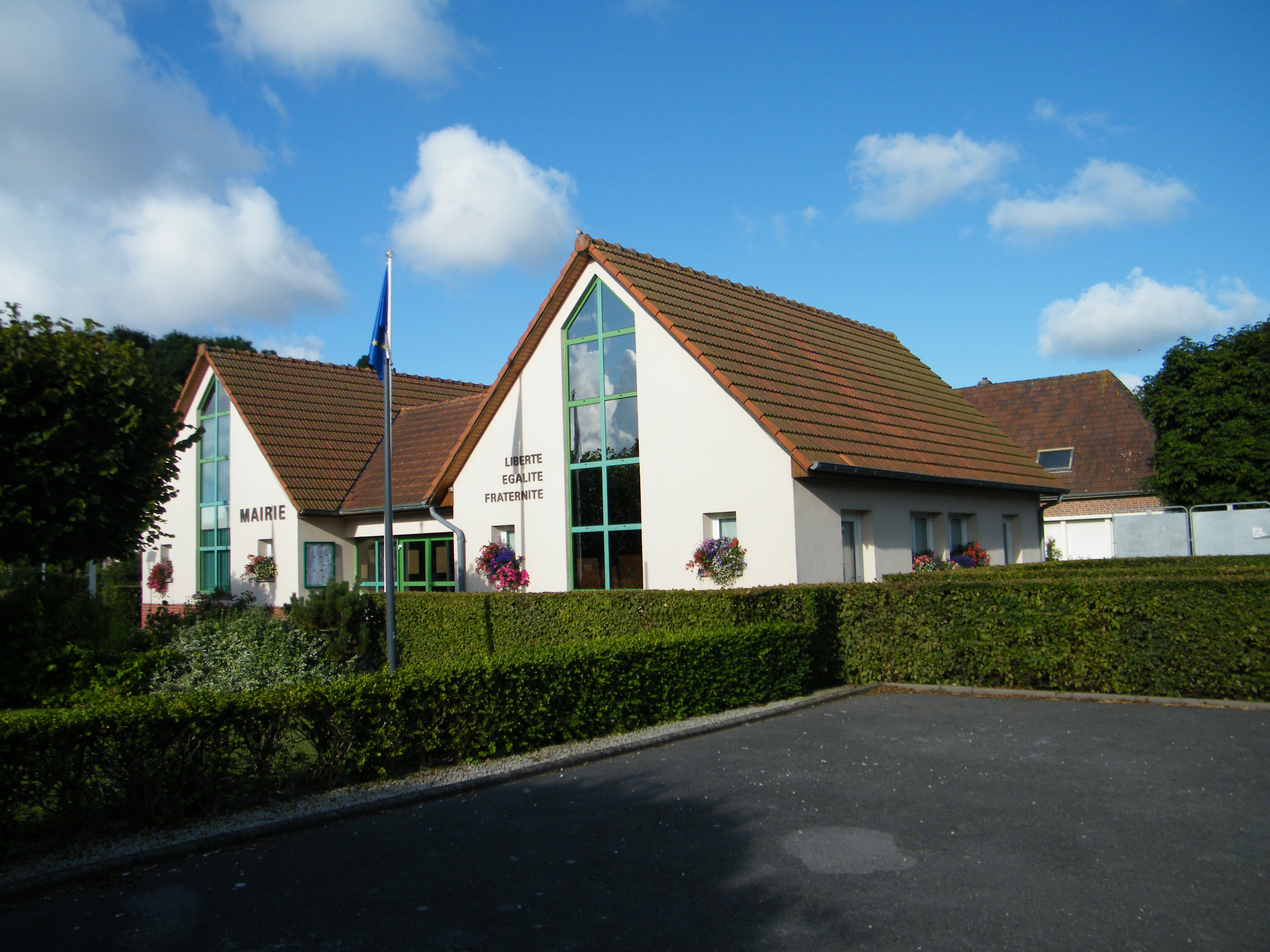 Berneval-le-Grand, Seine-Maritime, France, mairie